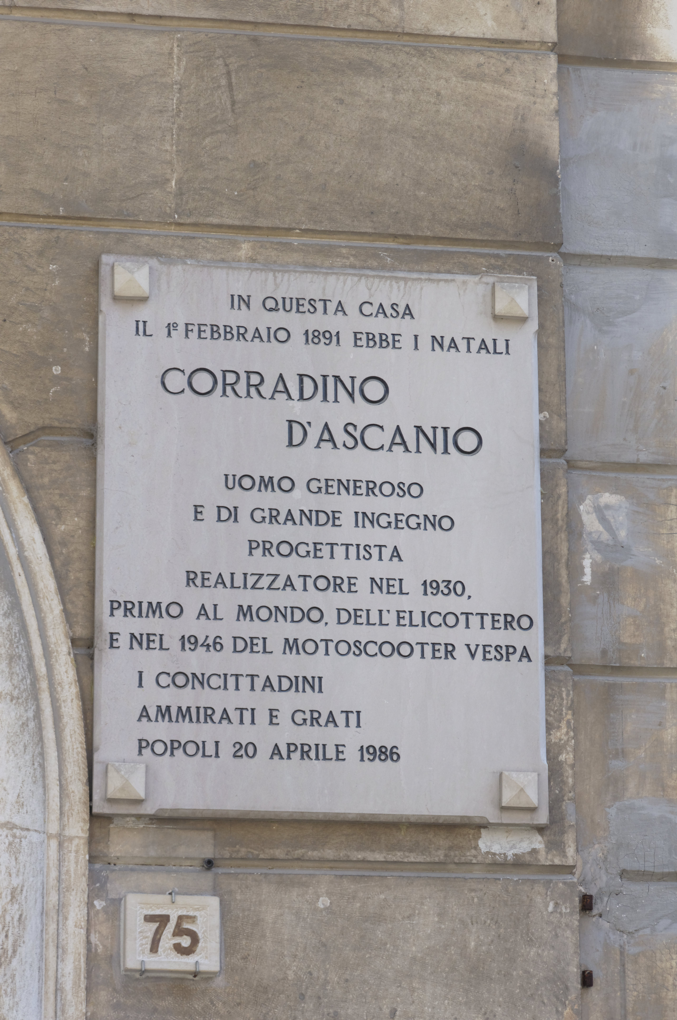 Popoli 2016